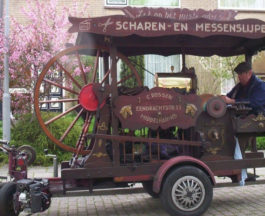 Scharensliep met zijn kar (gemotoriseerd!)